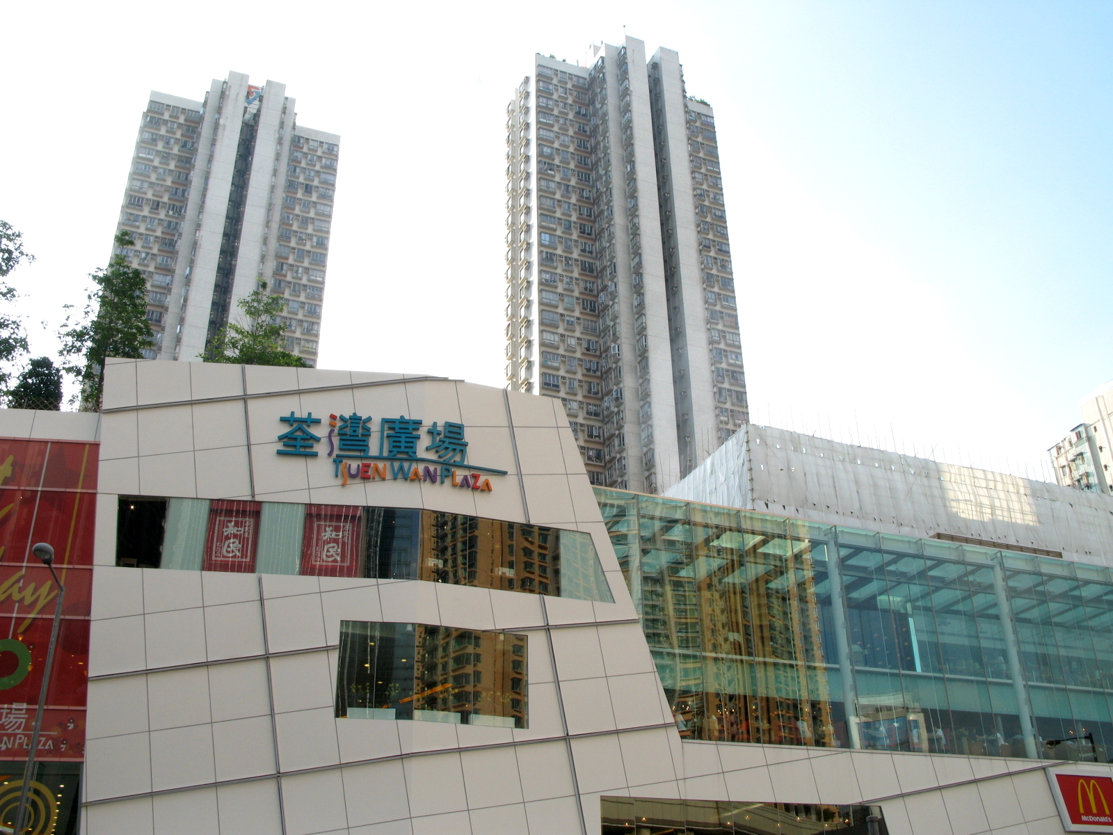 HK Tsuen Wan Plaza